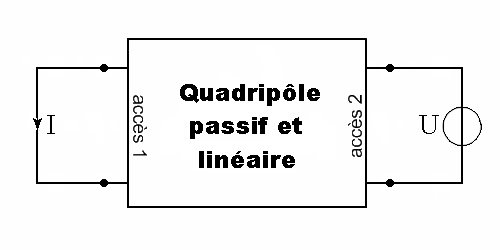 Schéma électrique d'explication